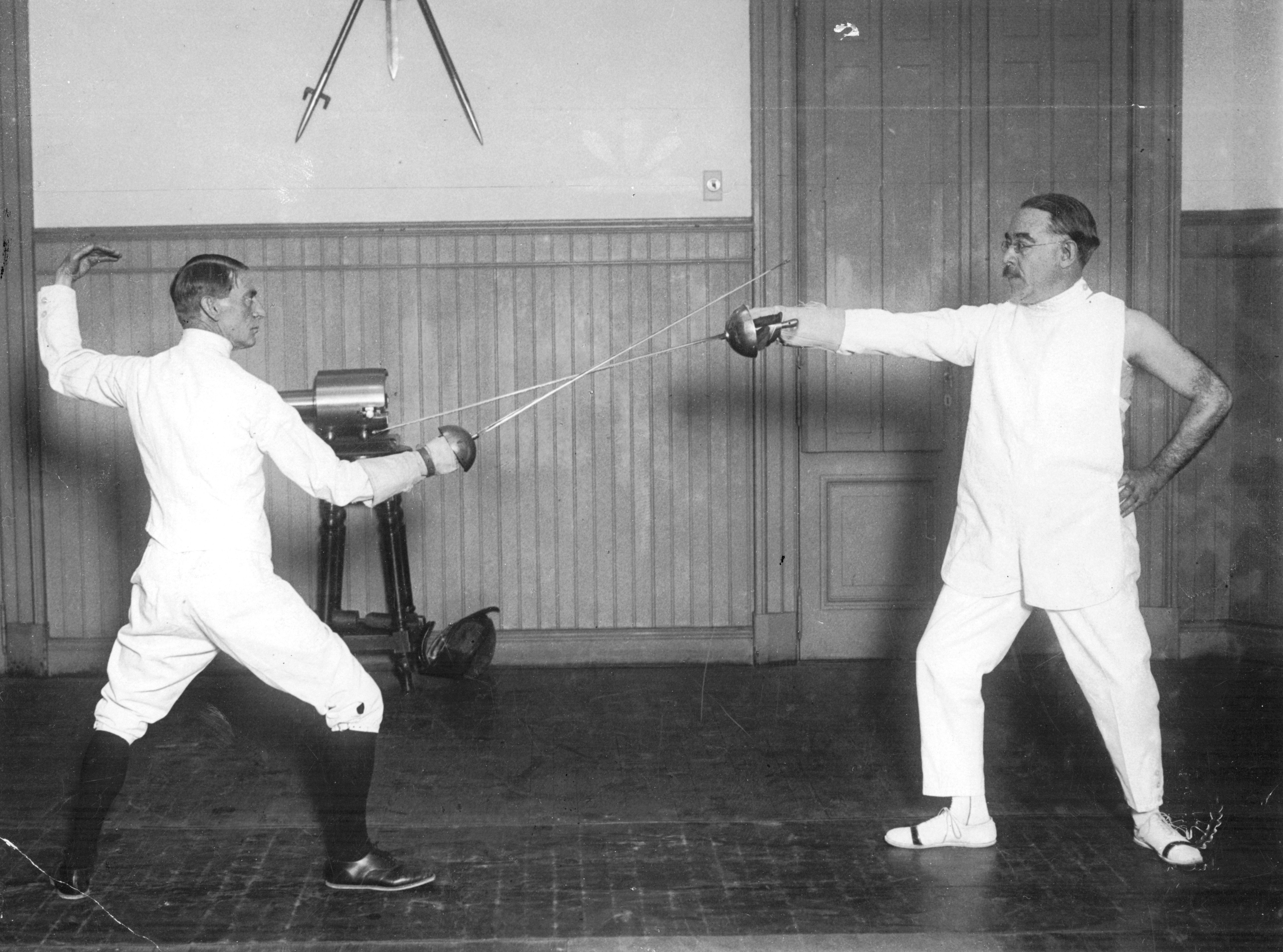 Leopoldo Lugones practicando esgrima, Buenos Aires 1927. Inventario 4504. General Archive of the Nation (Argentina) Native nameArchivo General de la Nación ArgentinaLocationBuenos Aires, ArgentinaEstablished28 August 1821WebsiteAGNAuthority control : Q2860529 This file, was provided to Wikimedia Commons thanks to an agreement between the General Archive of the Nation of Argentina and Wikimedia Argentina.